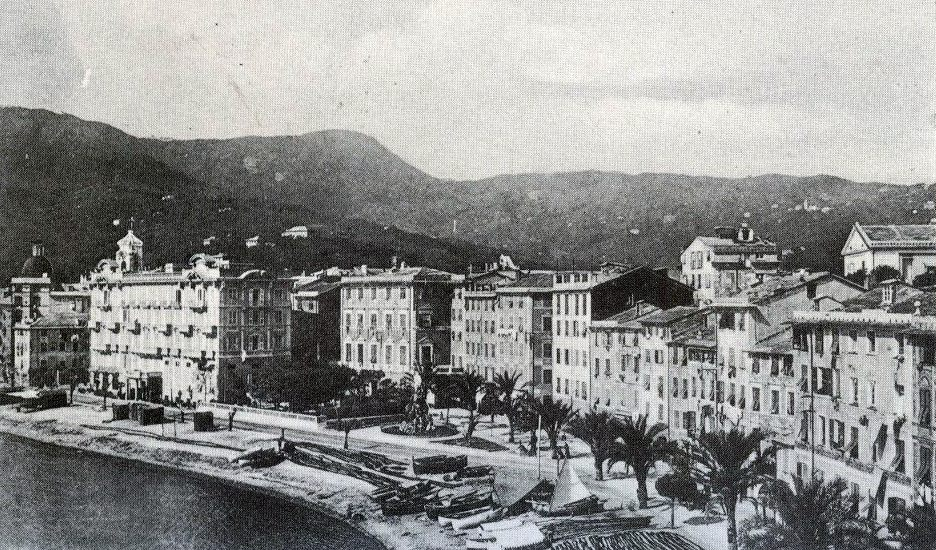 Panorama di inizio Novecento di Santa Margherita Ligure, Liguria, Italia